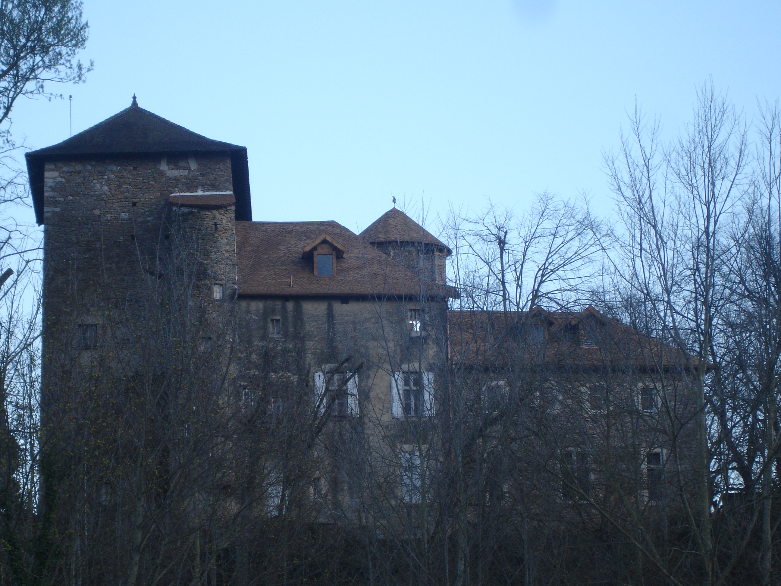 Villemoirieu : la commanderie de Montiracle